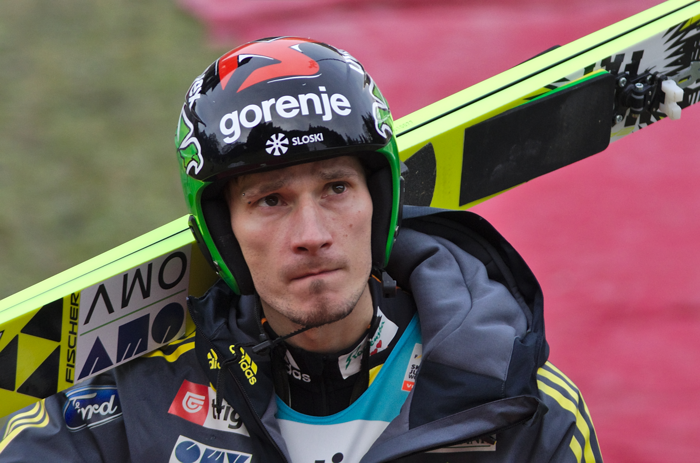 FIS Ski Jumping World Cup 2014 - Engelberg - 20141221 - Robert Kranjec